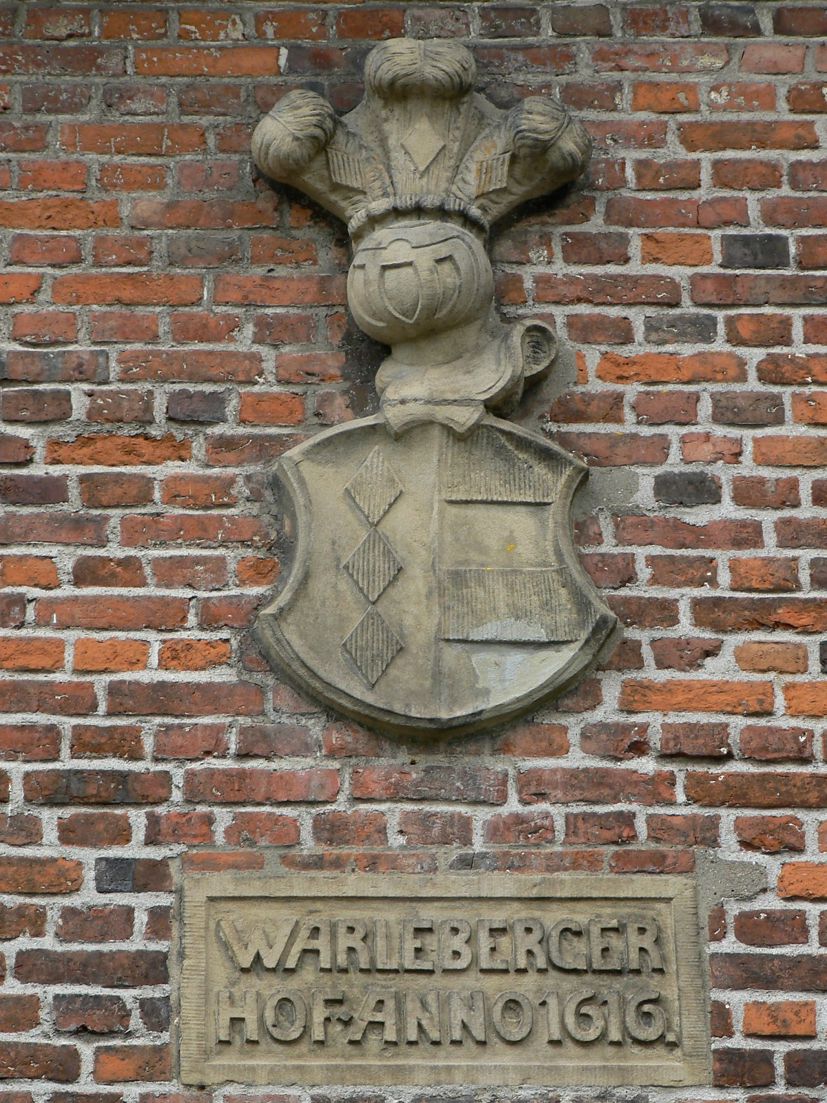 Wappen an der Seitenwand des Warleberger Hofs - Der einzig erhaltene Adelshof in Kiel. Erbaut 1616, seit 1970 Teil des Kieler Stadtmuseums.